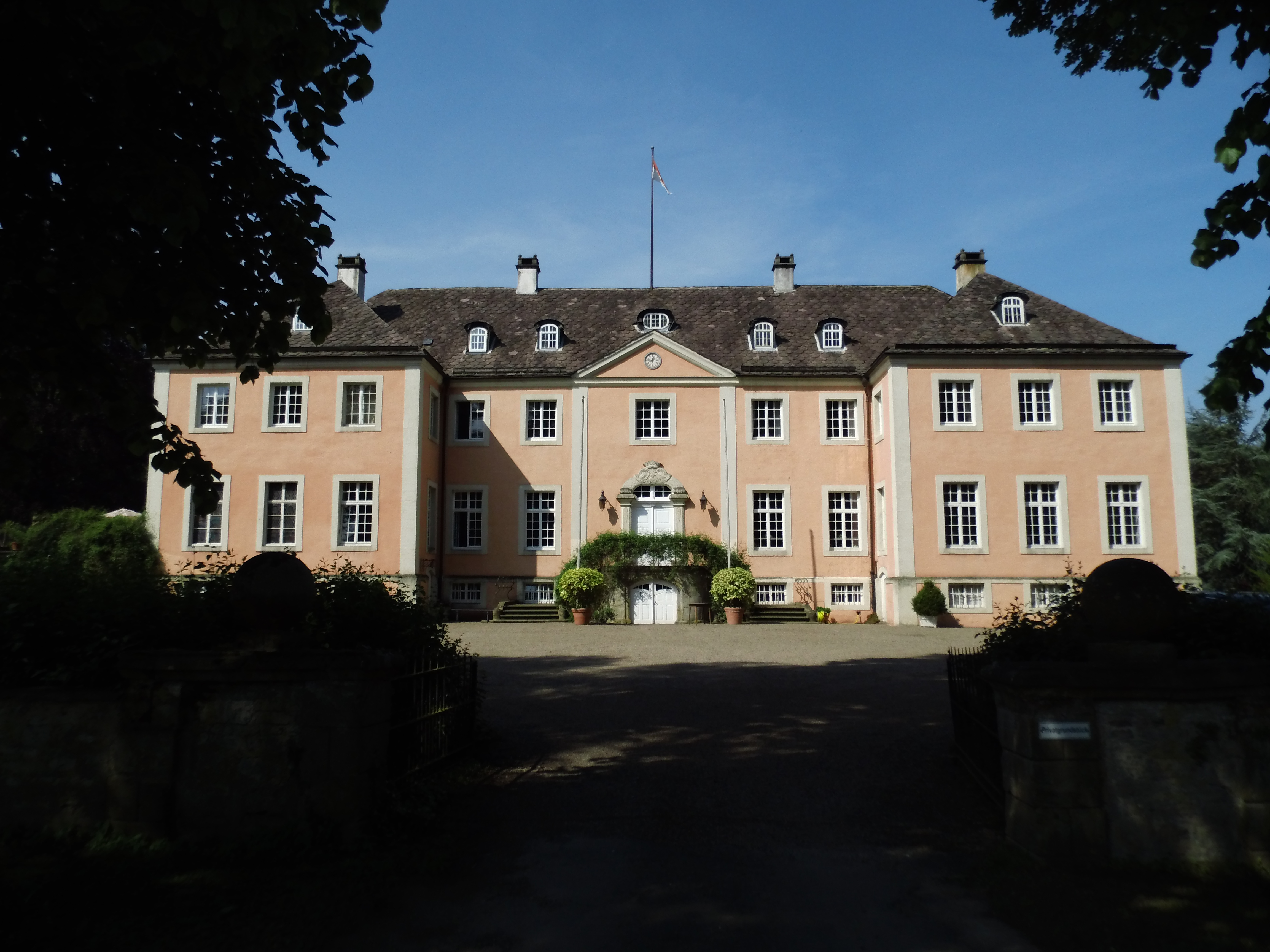 Baudenkmal, Liste der Baudenkmäler in Brakel Nr. 158